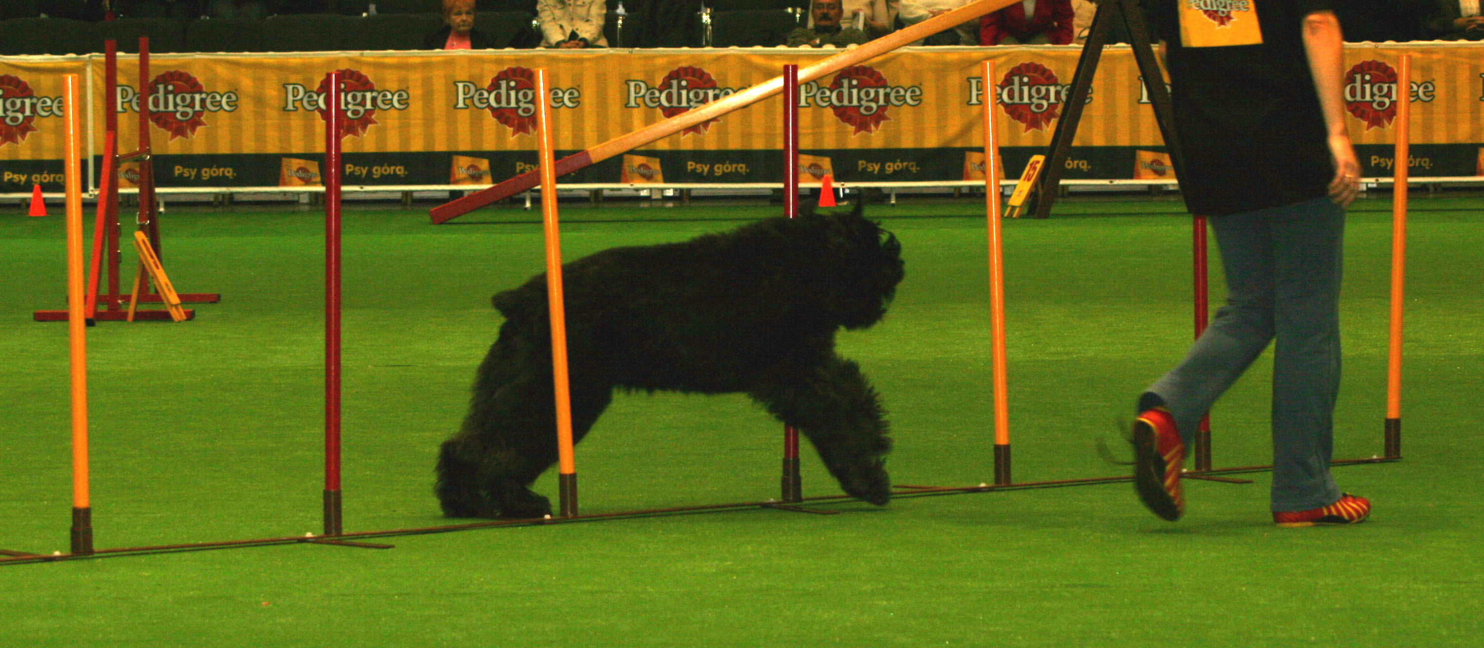 Bouvier de flandres na Światowej Wystawie Psów Rasowych w Poznaniu podczas agility.